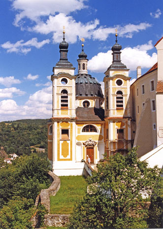 Česky: Zámecká kaple Nejsvětější Trojice u zámku ve Vranově nad Dyjí.